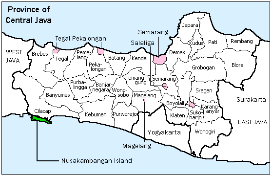 Emplacement de Nusa Kambangan (en vert sur la carte). Basa Banyumasan: Pulo Nusakambangan, Kabupaten Cilacap, Jawa Tengah.